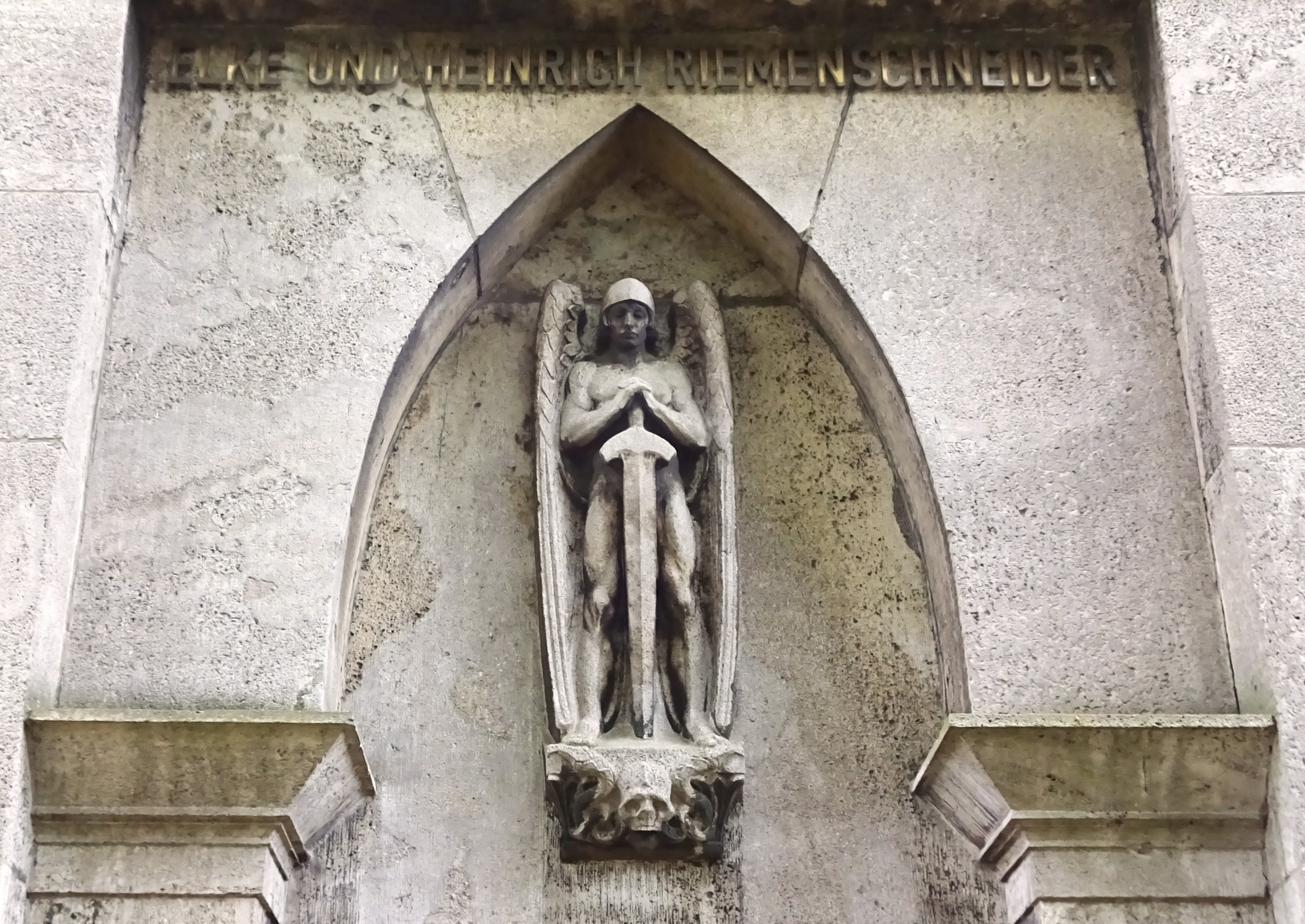 Mausoleum Nahrhaft mit Erzengel Michael (Todesengel) von Johannes Knubel vom mystischen Figurenprogramm über dem Eingangsportal auf dem Nordfriedhof Düsseldorf.